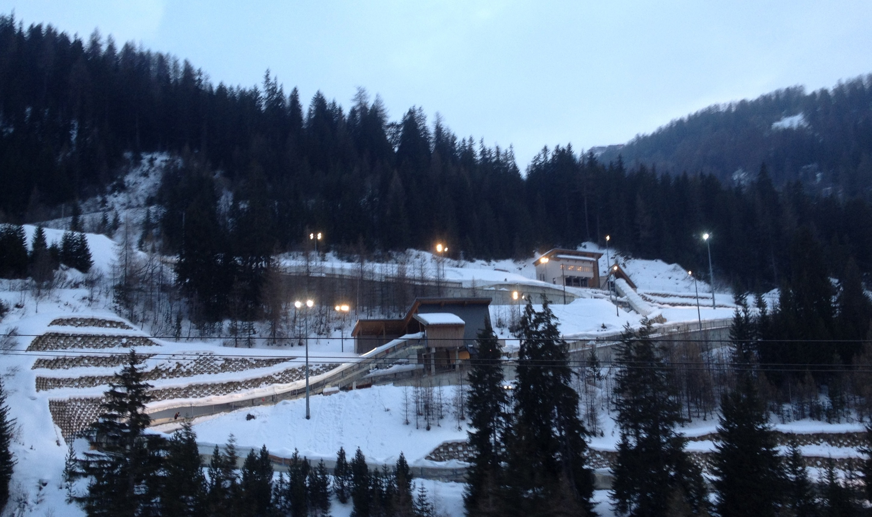 Le haut de la piste de bobsleigh de La Plagne, en France.